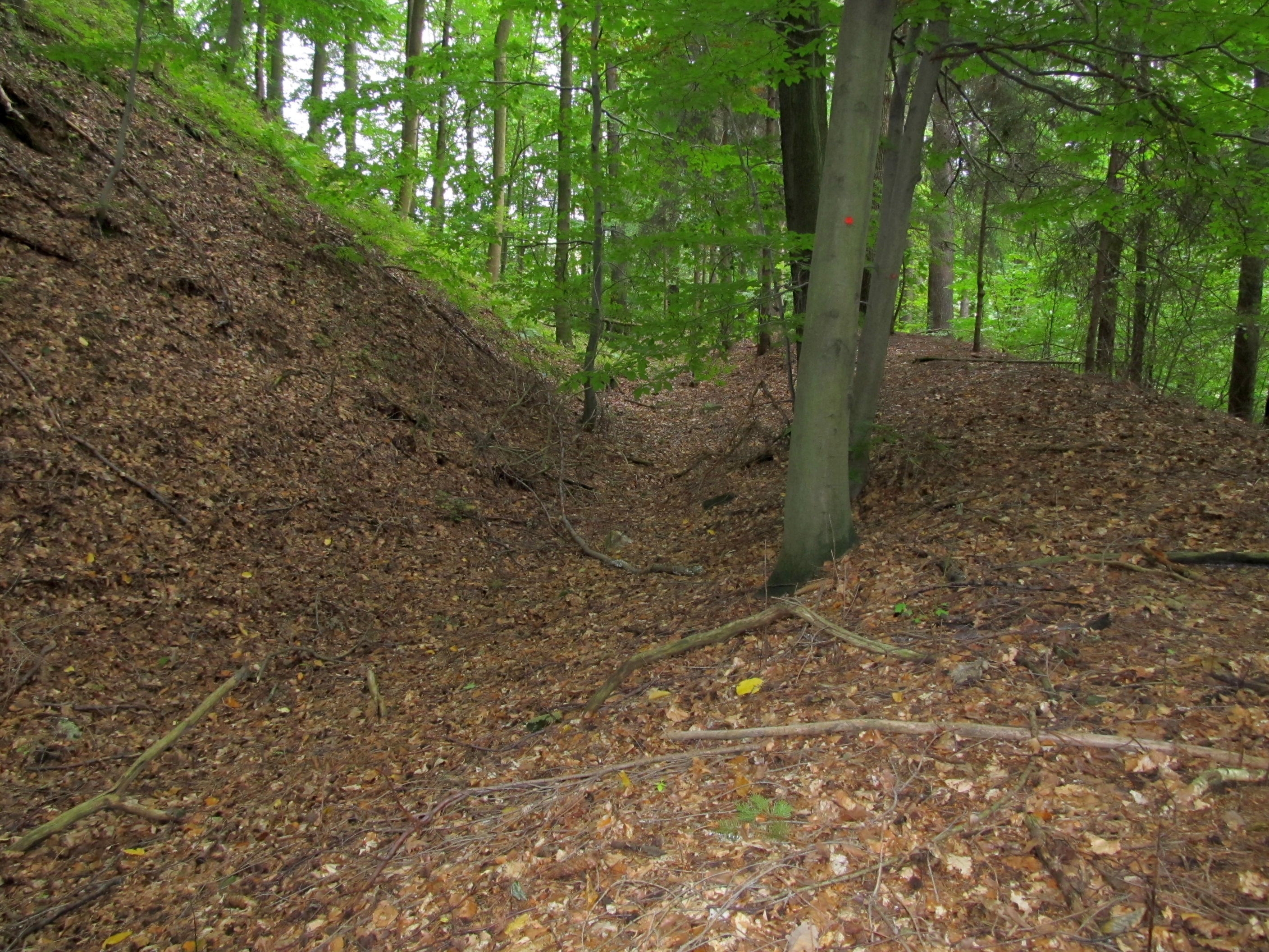 Hrad Červená Hora, zřícenina (Červená Hora), ostroh nad řekou Úpou, Červená Hora